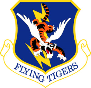 23d Wing Shield